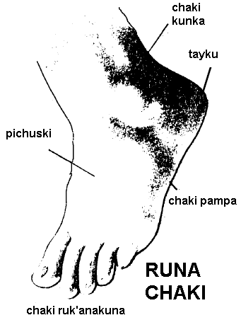 Runa Simi: Runap chakin